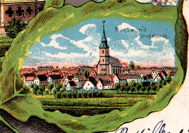 Bettviller - Kirche mit Umgebung